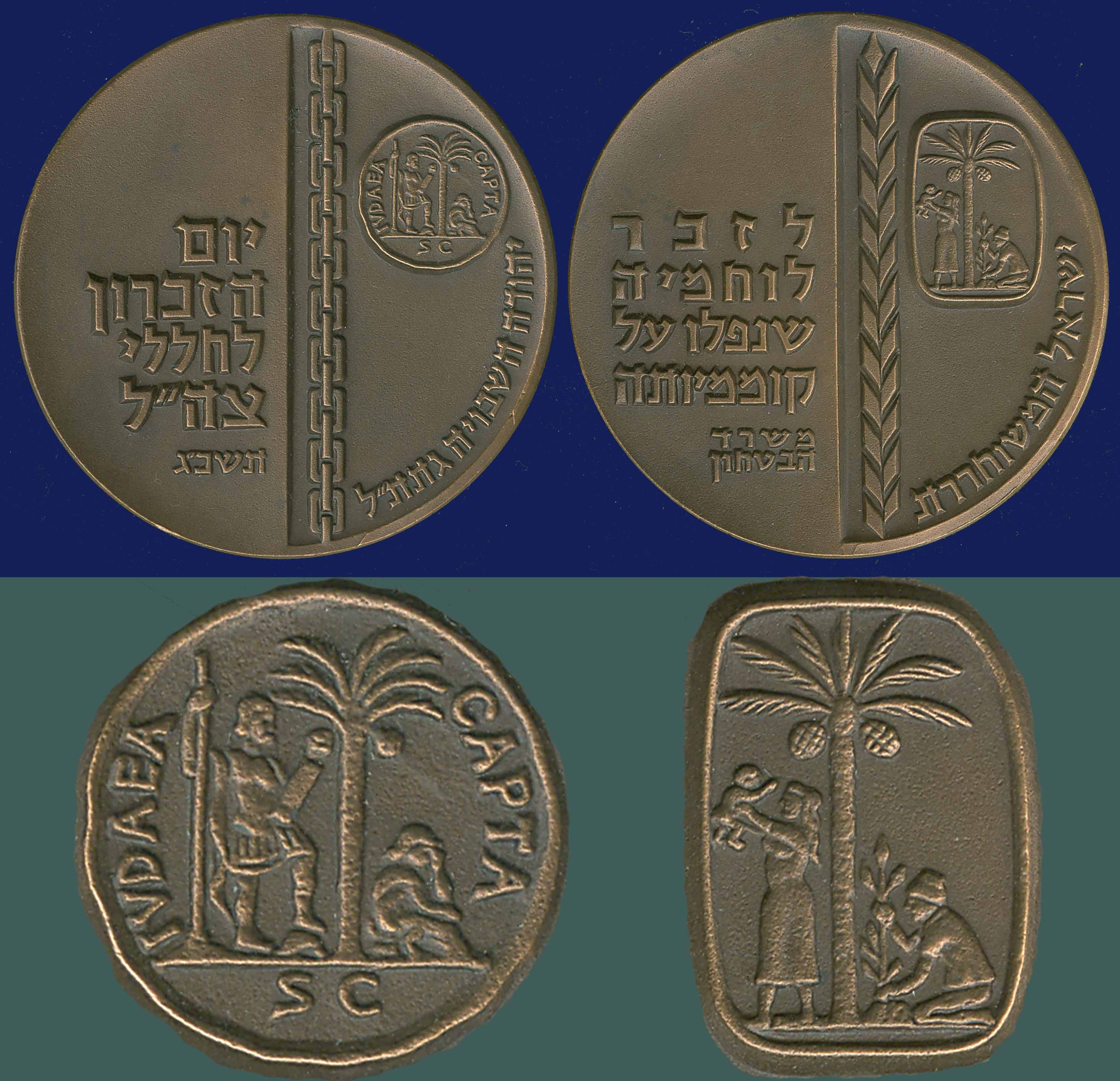 1963 מדליית זכרון לחללי צה"ל